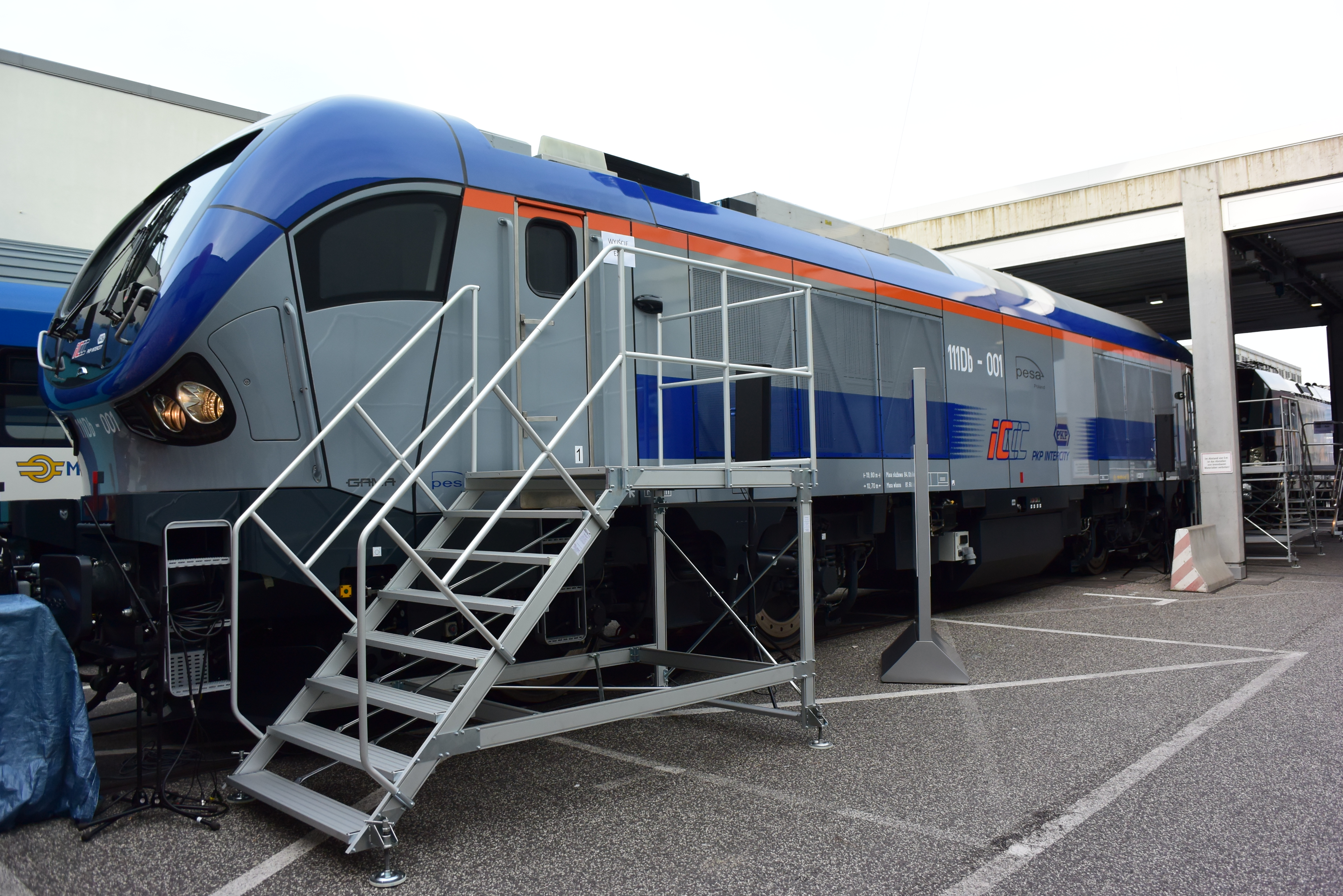 PESA Gama podczas InnoTrans 2014